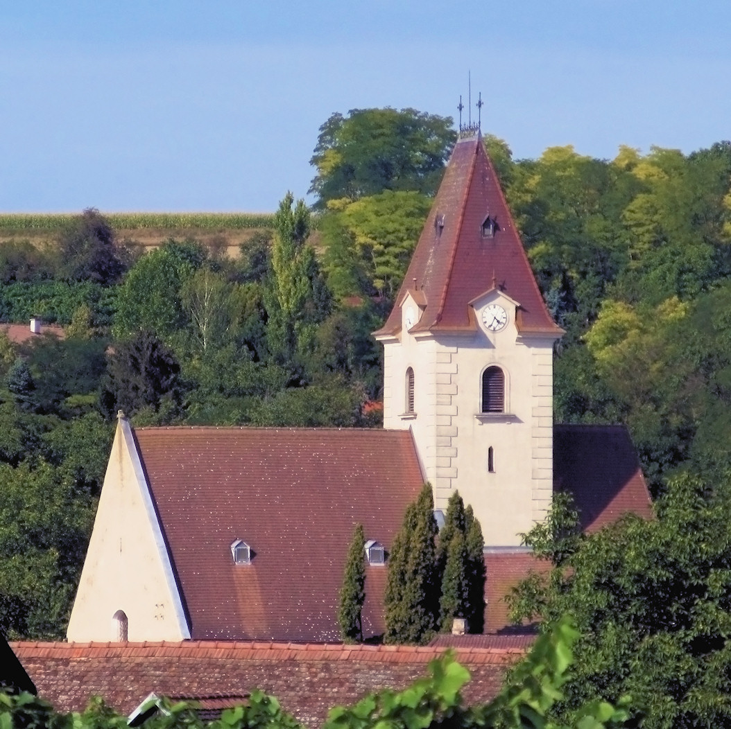 Kath. Pfarrkirche hl. Ägidius